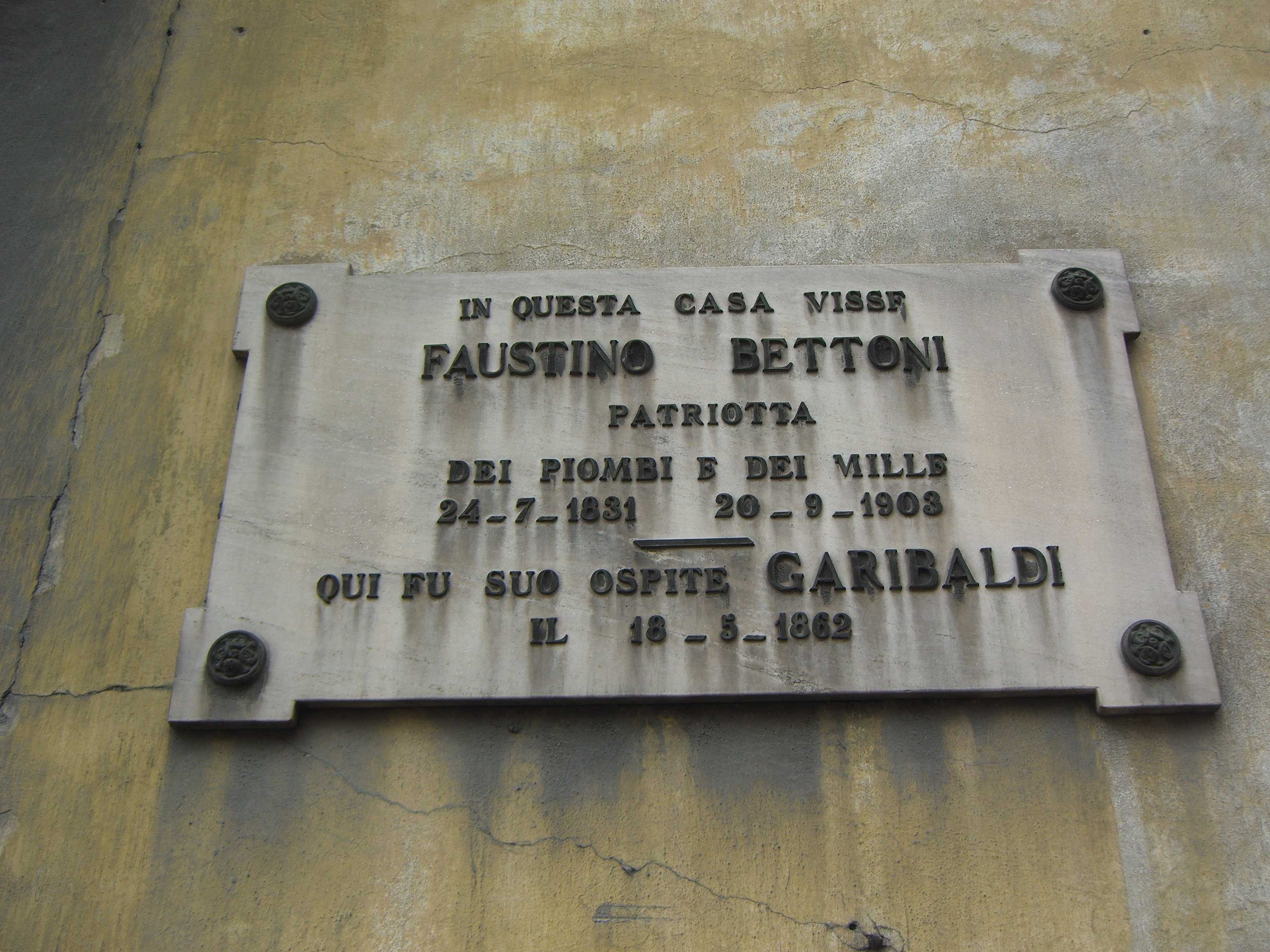 BG Casazza targa commemorativa di Faustino Bettoni patriota dei Piombi e dei Mille